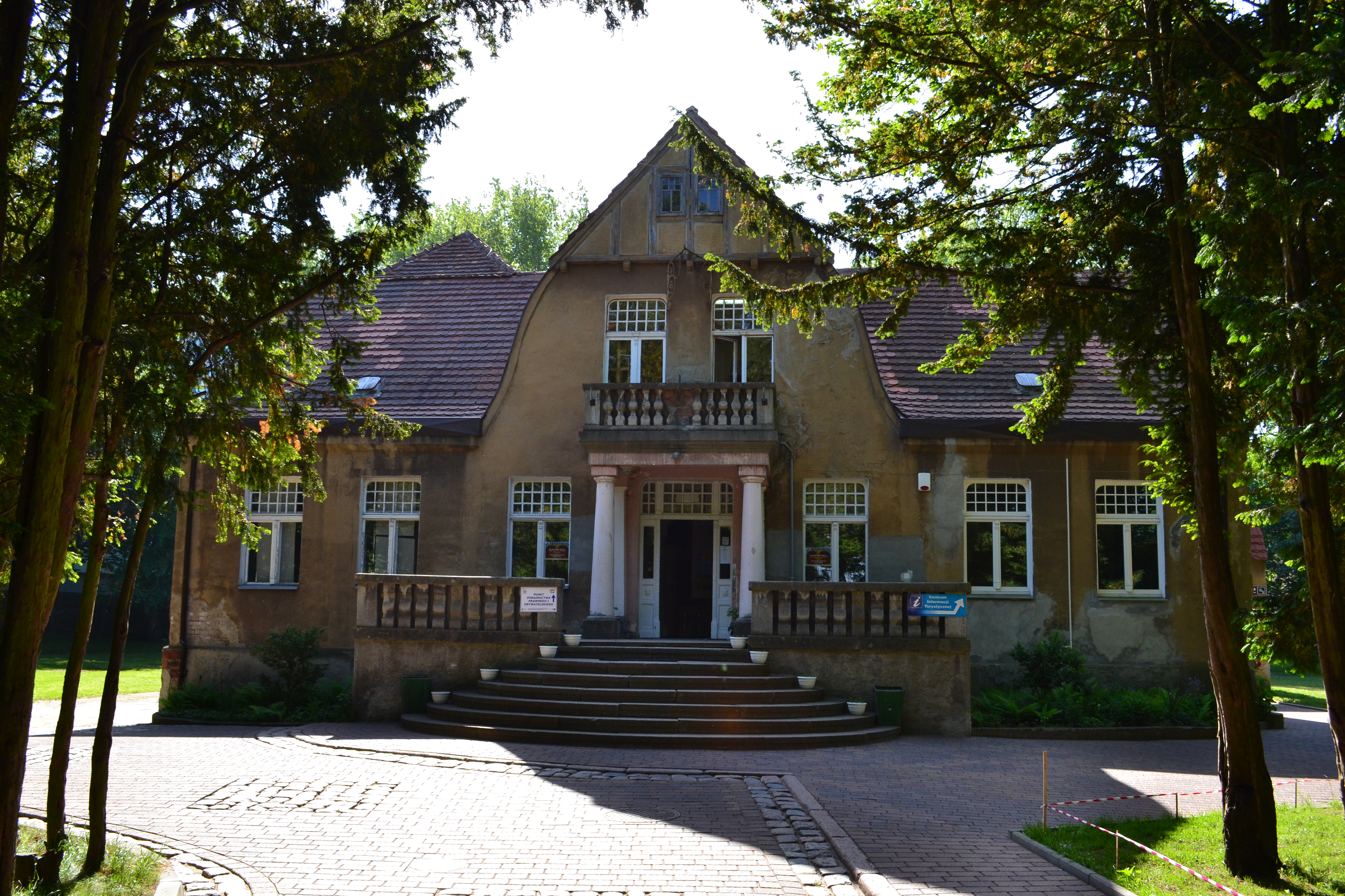 Pałacyk pod Lwami; Gryfino ul. Bolesława Chrobrego 48